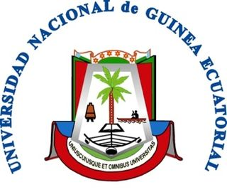 Logotypus universitatis UNGE